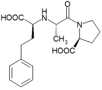 molekula structure of enalaprilat